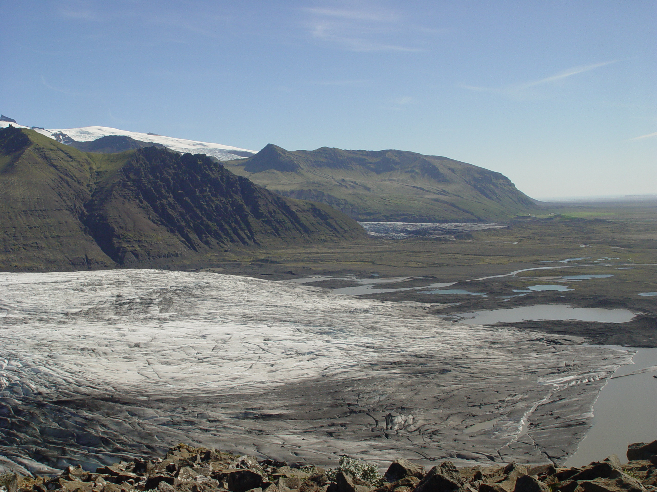 Skaftafellsjökull, August 2006